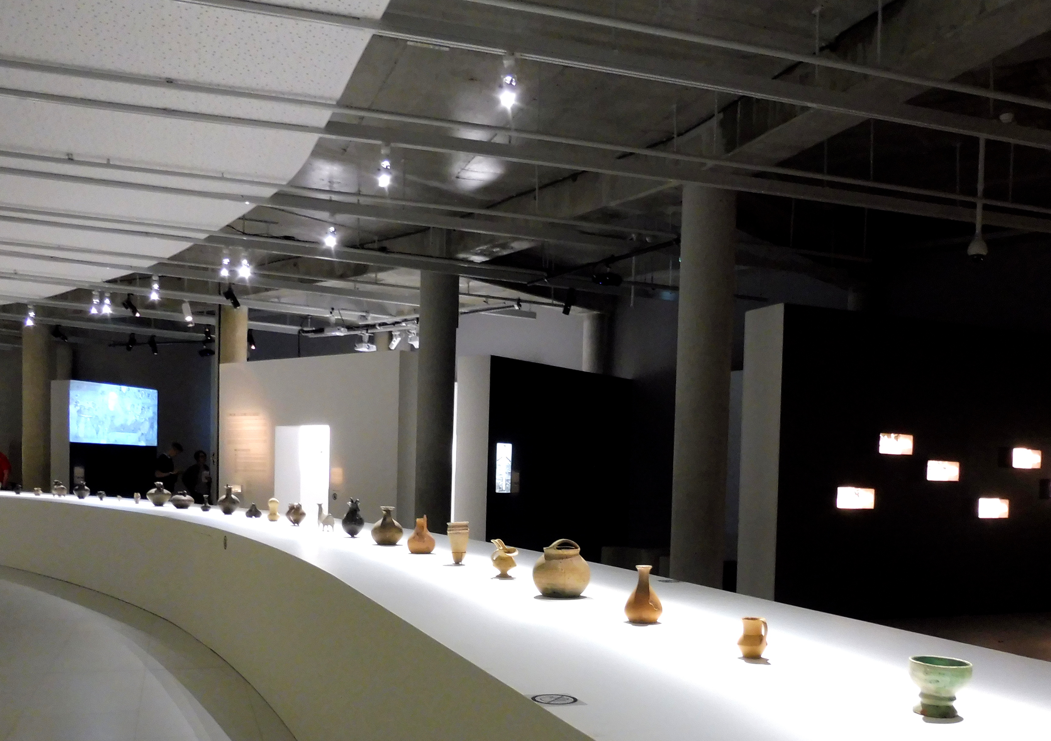 Exposition sur l'histoire de la viticulture en Géorgie, Cité du Vin de Bordeaux-33 ː 50 récipients vinaires pour 8 000 ans d'histoire.